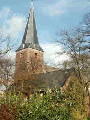 Eigen foto